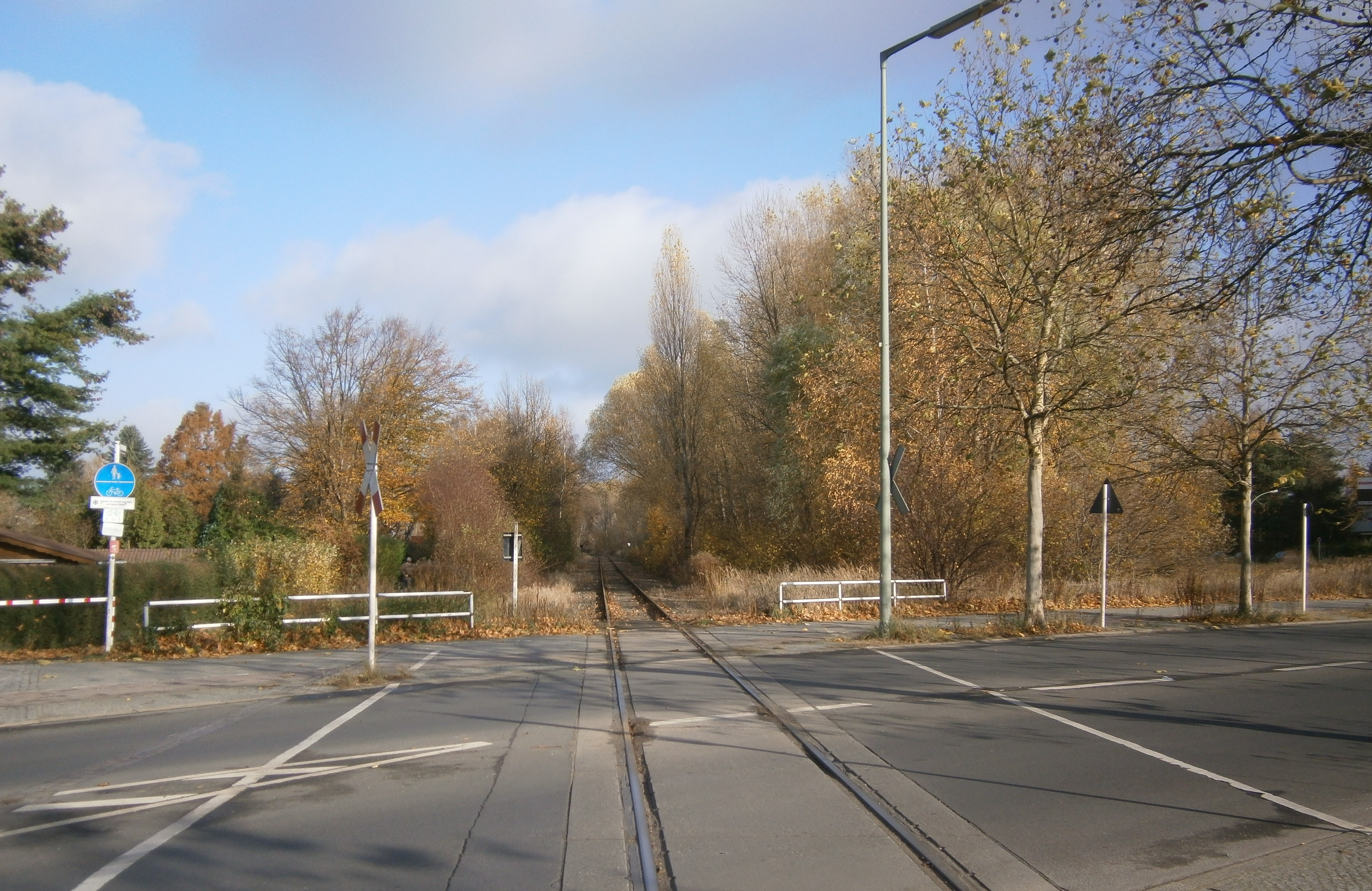 Der Wilhelmsruher Damm ist eine Straße in Berlin-Rosenthal. Blick nach Norden von der Ecke der Uhlandstraße entlang der ehemalign Bahnstrecke.